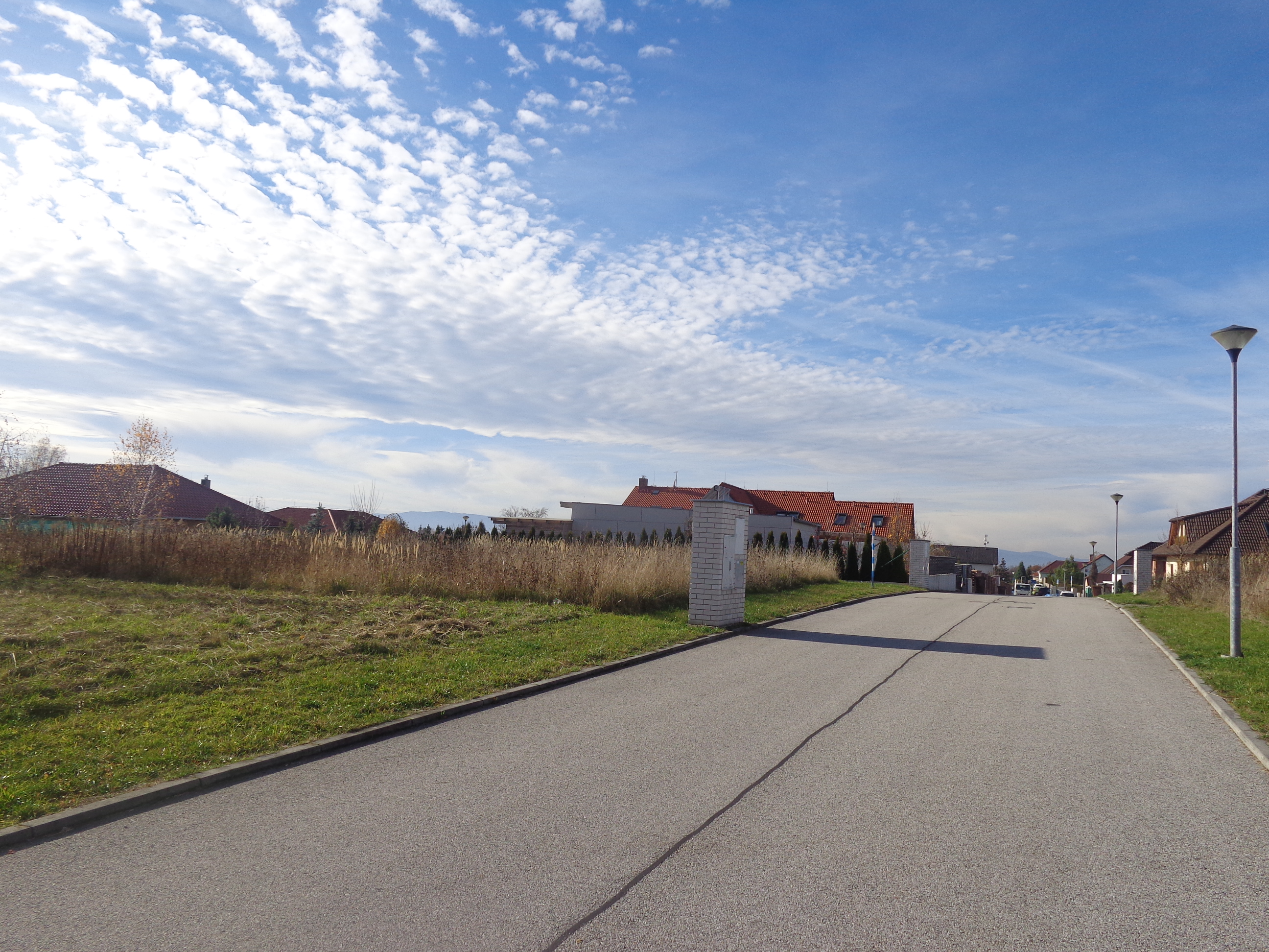 Hlincová hora (571 m) v Lišovském prahu - vrcholové partie (ulice Na Kopečku) - v pozadí Kleť a Boubín